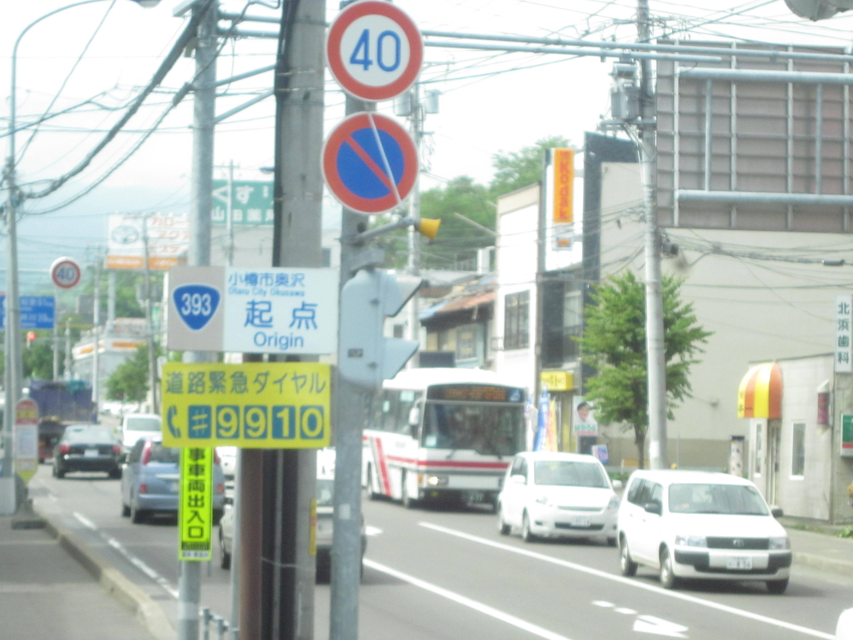 国道393号起点